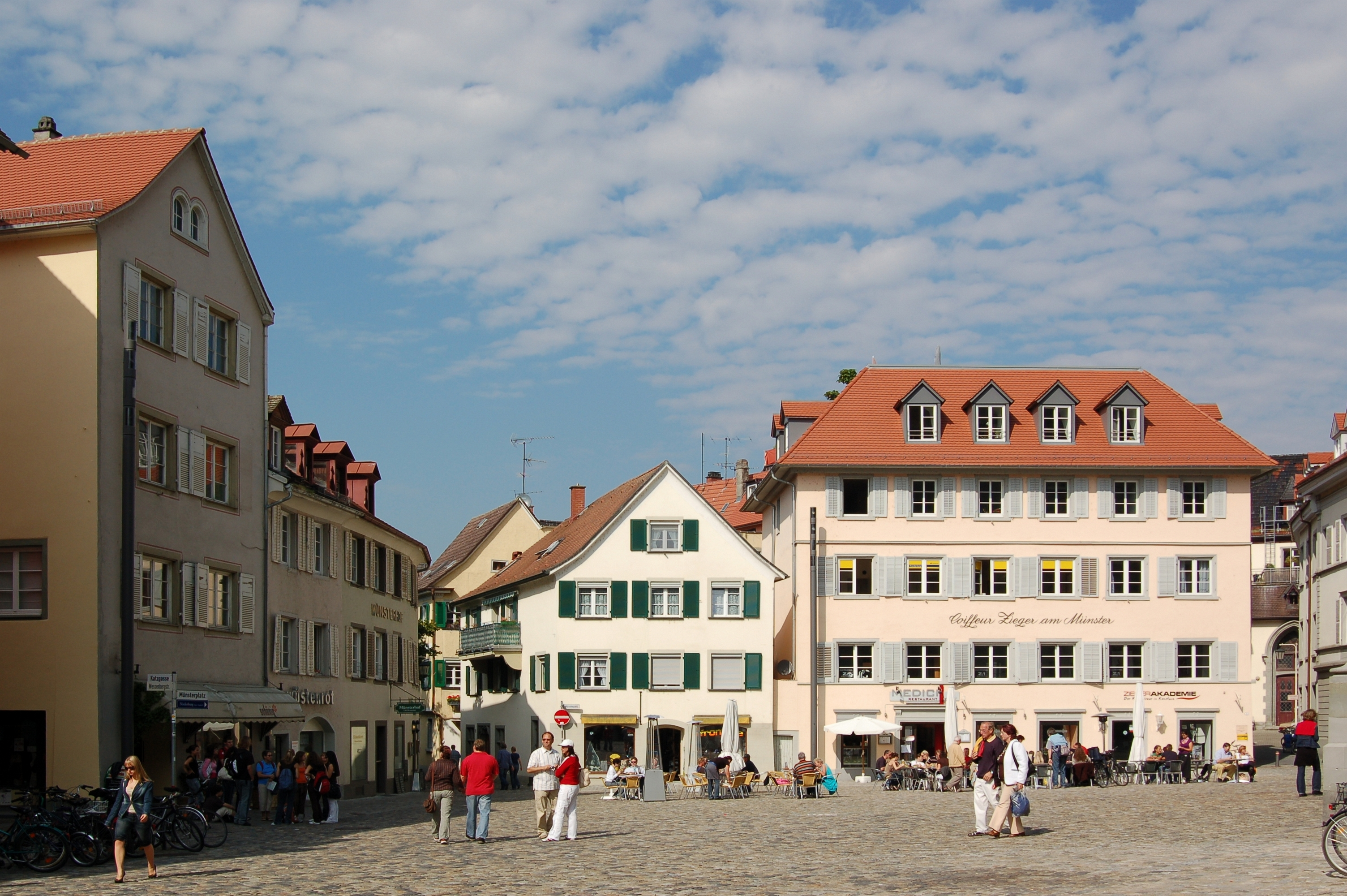 Zwischen Münster und Rhein erstreckt sich mit der Niederburg der älteste Stadtteil von Konstanz. Ein Bummel durch das ursprünglich von Fischern und Handwerkern bewohnte Gassengewirr ist quasi ein Ausflug in die Vergangenheit.